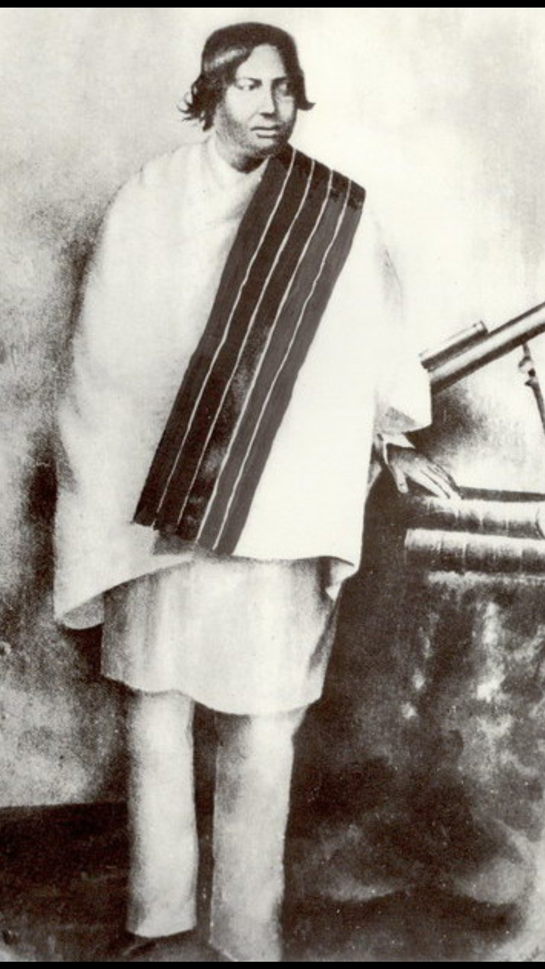 Prime minister of Madagascar